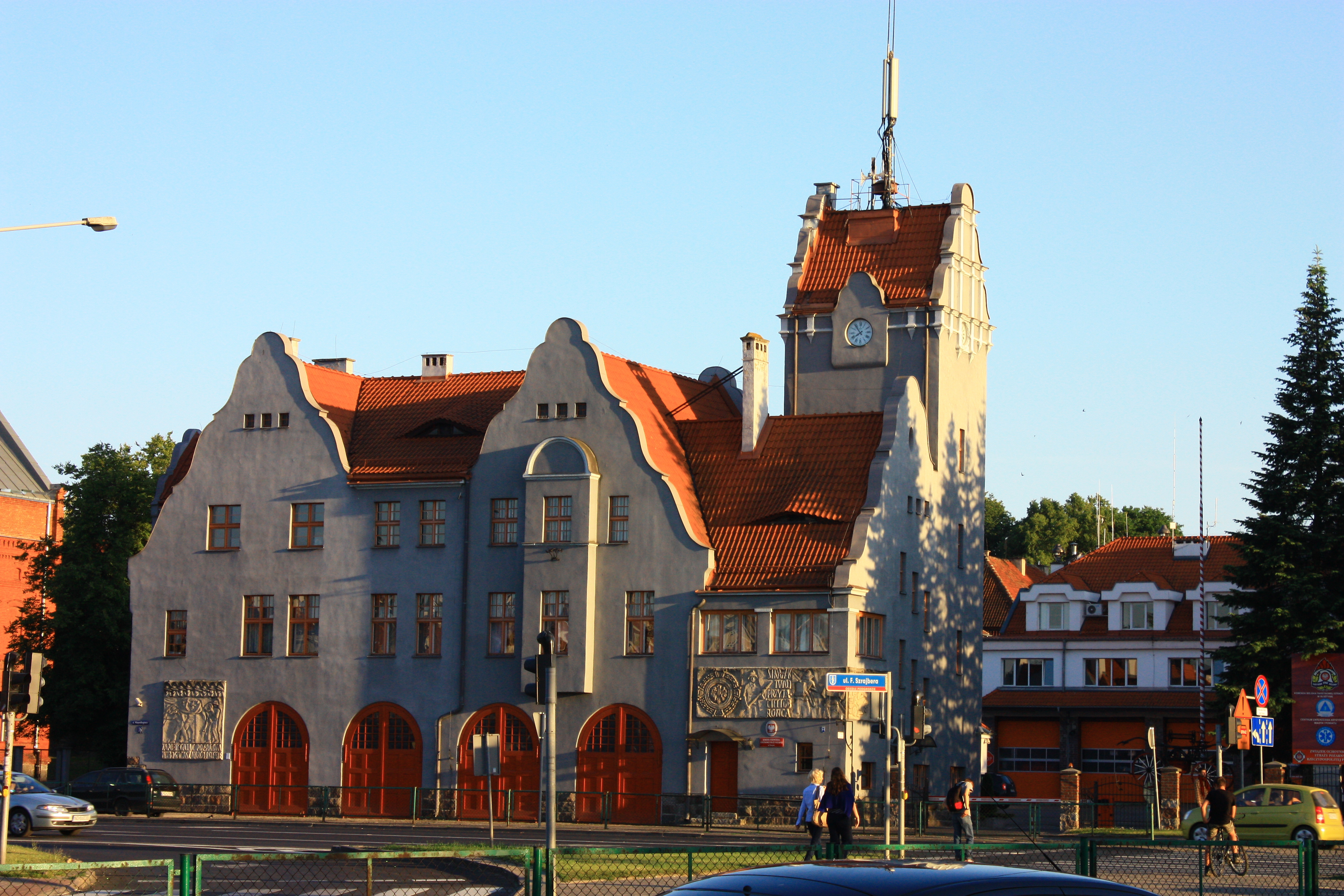 Olsztyn, remiza strażacka, XIX/XX